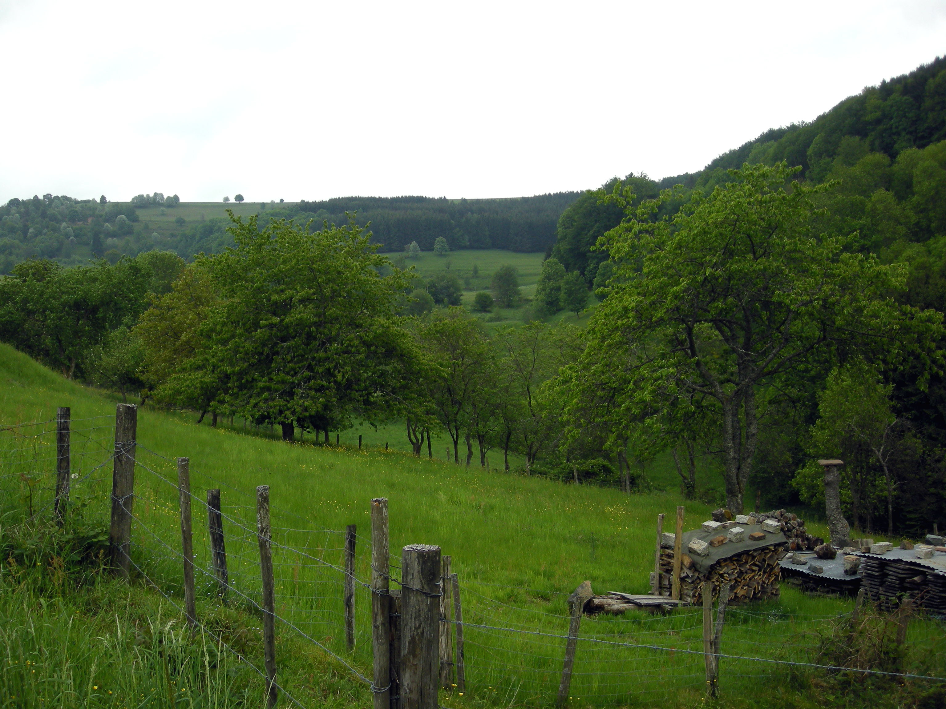 Paysage à Bellefosse (Bas-Rhin)